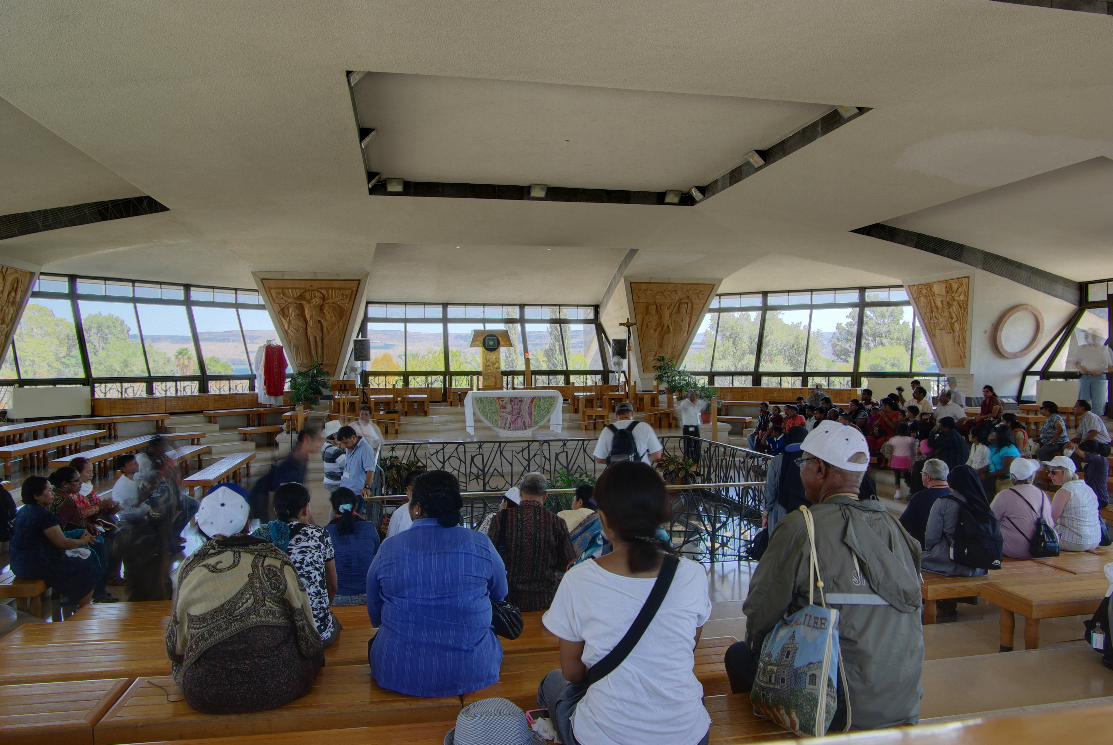 Kirche über dem Haus des Petrus